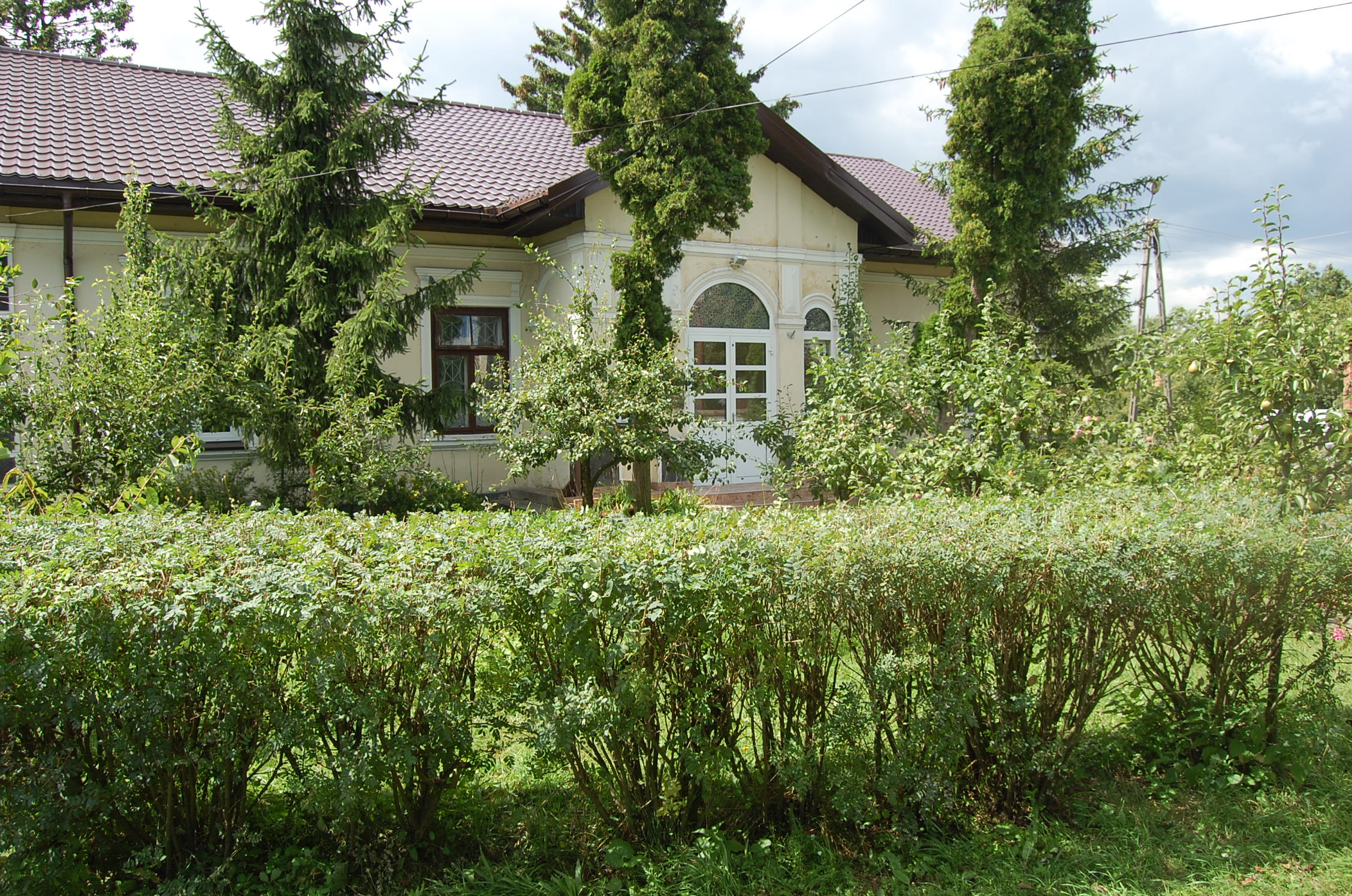 Plebania rzymskokatolicka w Jeruzalu